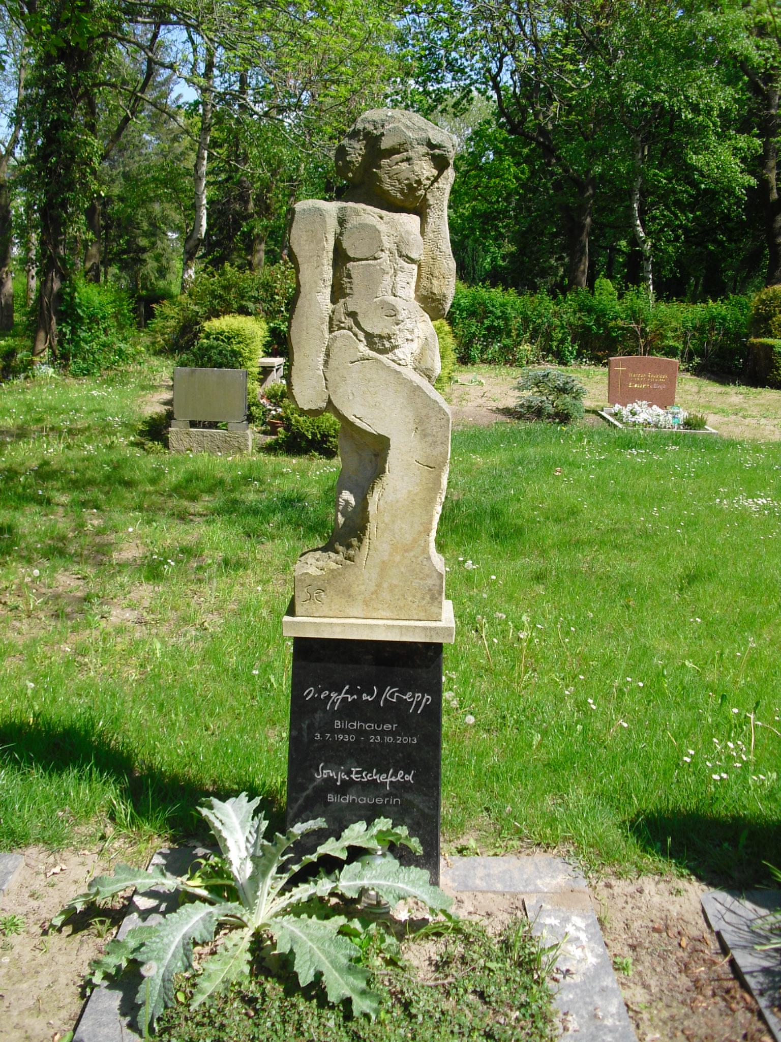 Grabdenkmal für Siegfried Krepp auf dem Auferstehungsfriedhof in Berlin-Weißensee. Mit einer Skulptur seiner noch lebenden Ehefrau, der Bildhauerin Sonja Eschefeld